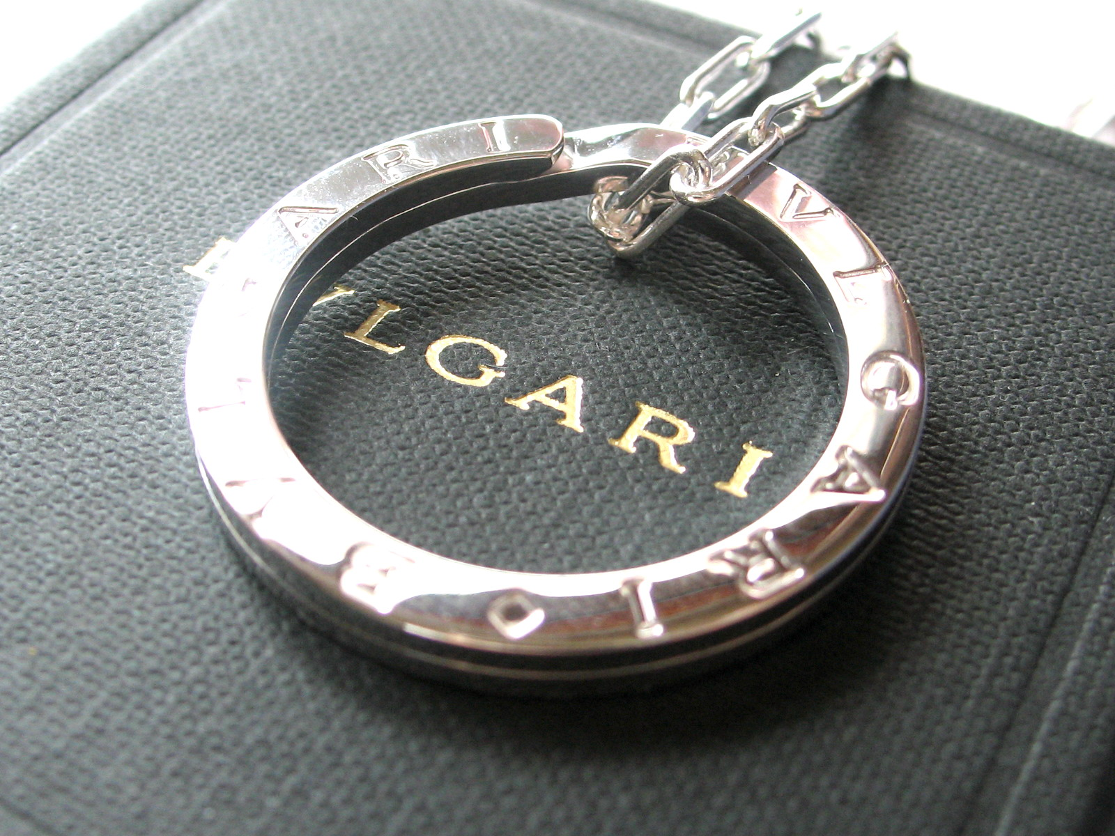 Bulgari Necklace